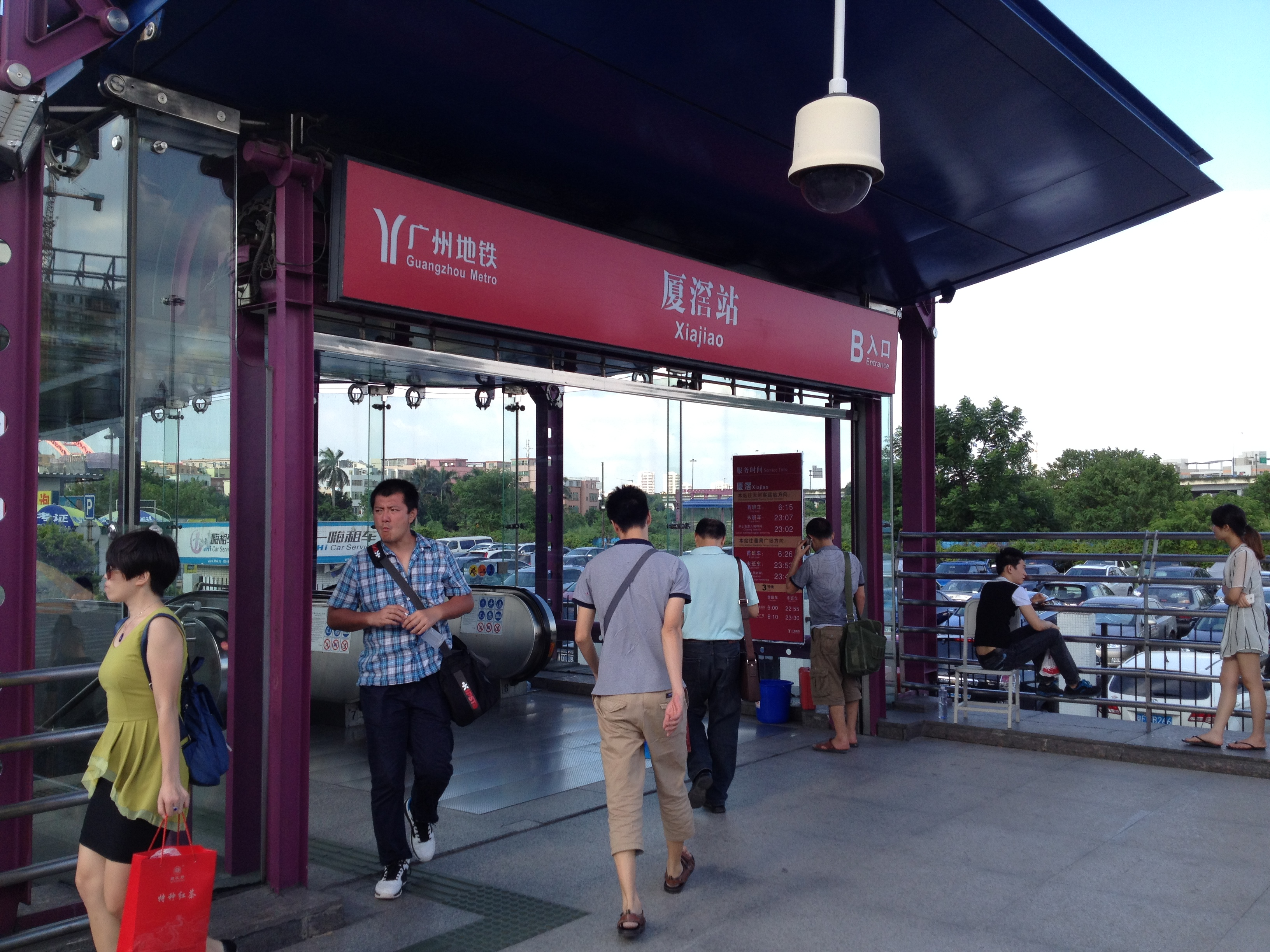 广州地铁厦滘站B出入口